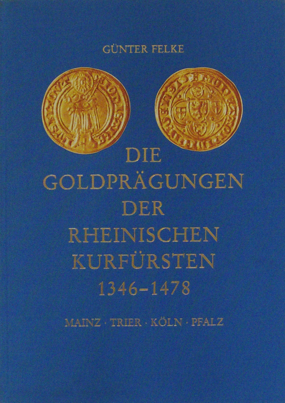 Buchcover „Die Goldprägungen der rheinischen Kurfürsten“